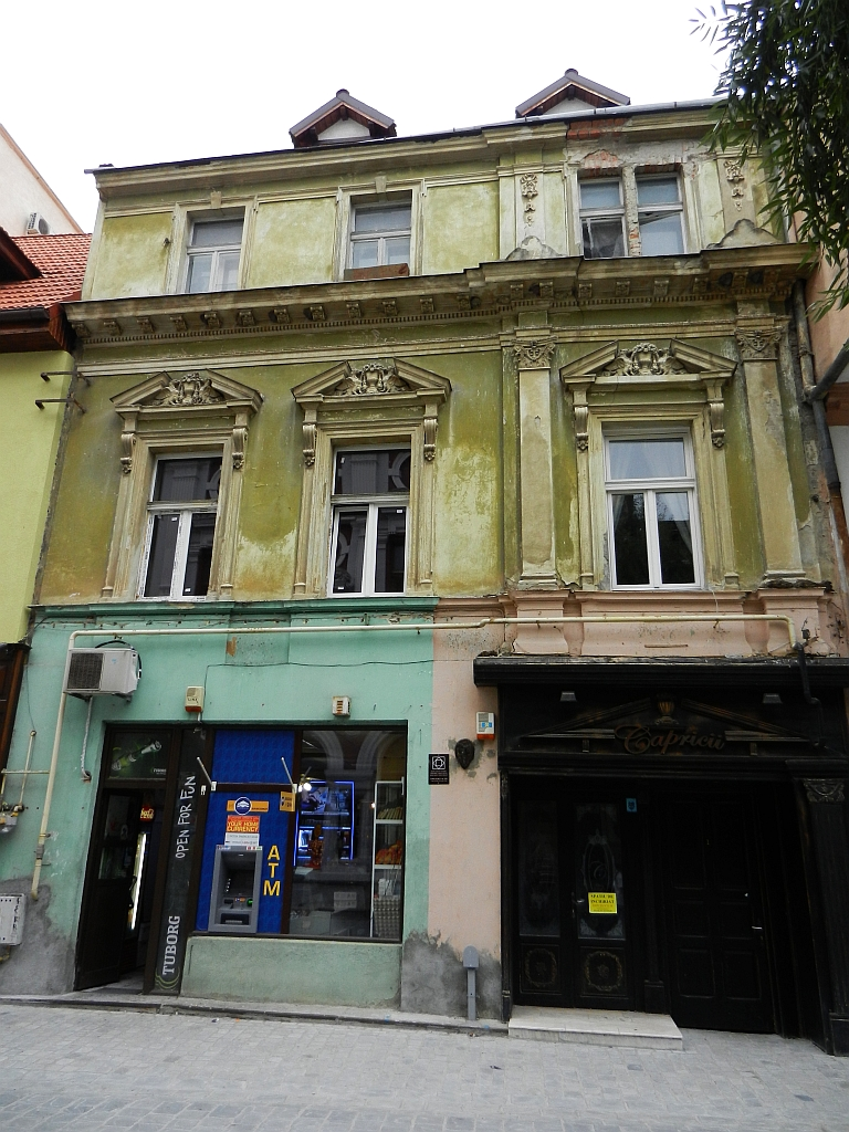 Casa Ciurcu